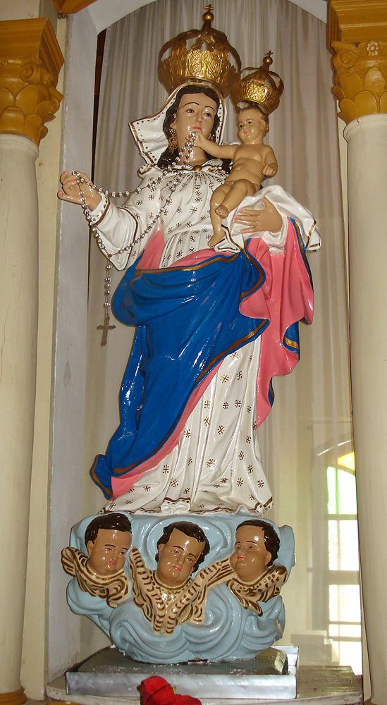 Nossa Senhora do Rosário, século XVIII, Igreja Bom Jesus, Triunfo, Rio Grande do Sul, Brasil. Repintada recentemente por artesão inábil.